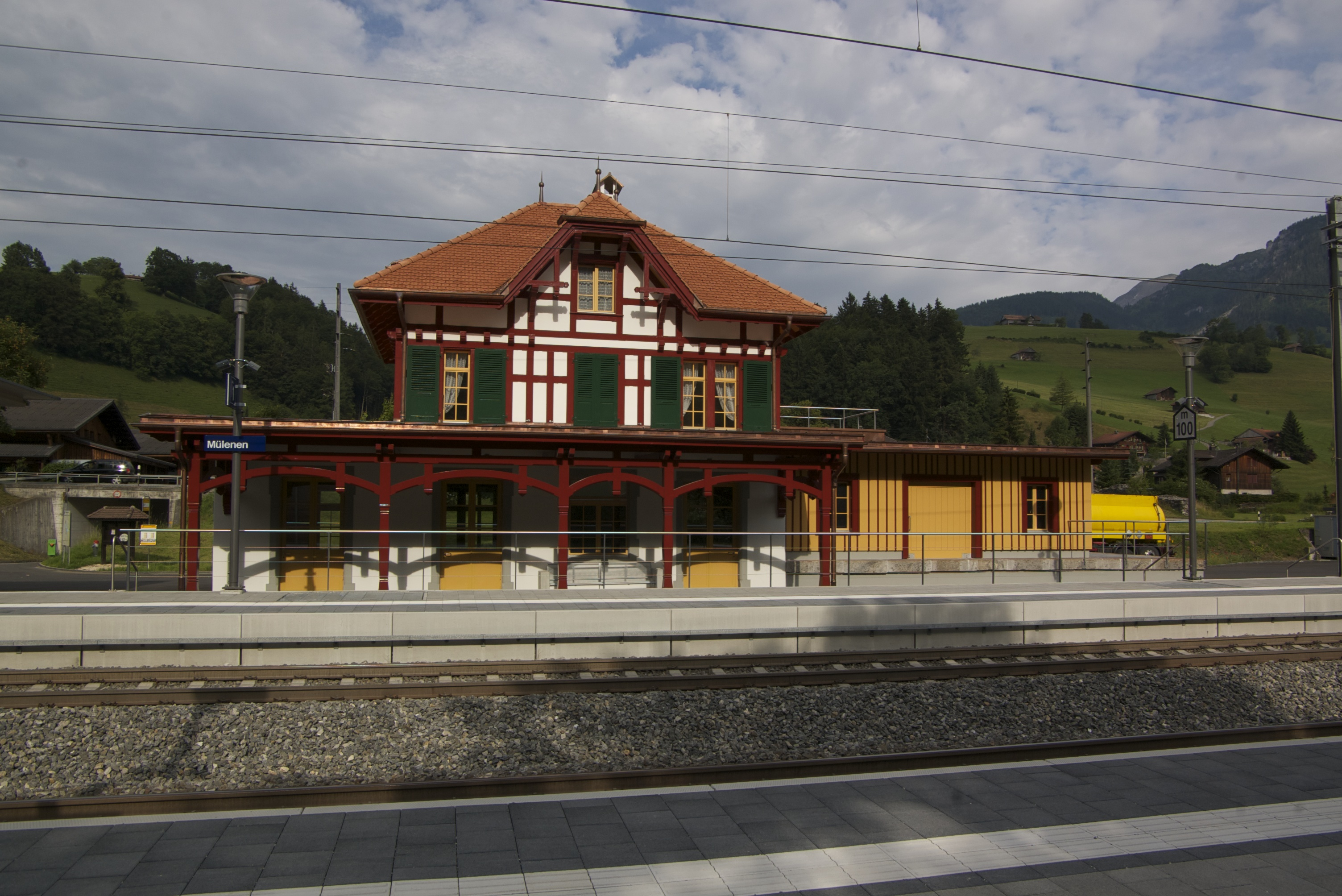 Stationsgebäud zů Mülenen im Kanderthal.